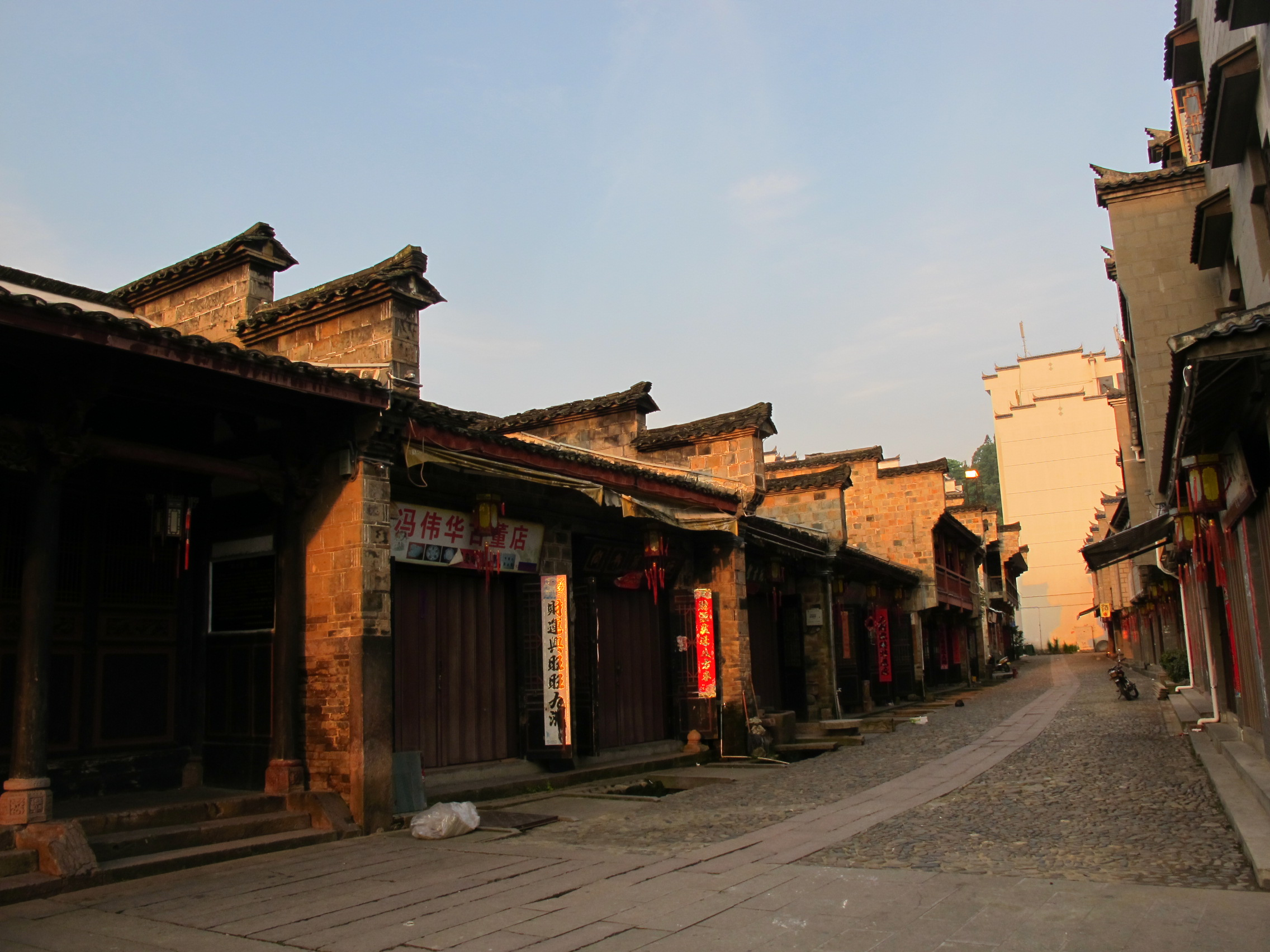 泰宁古城尚书巷